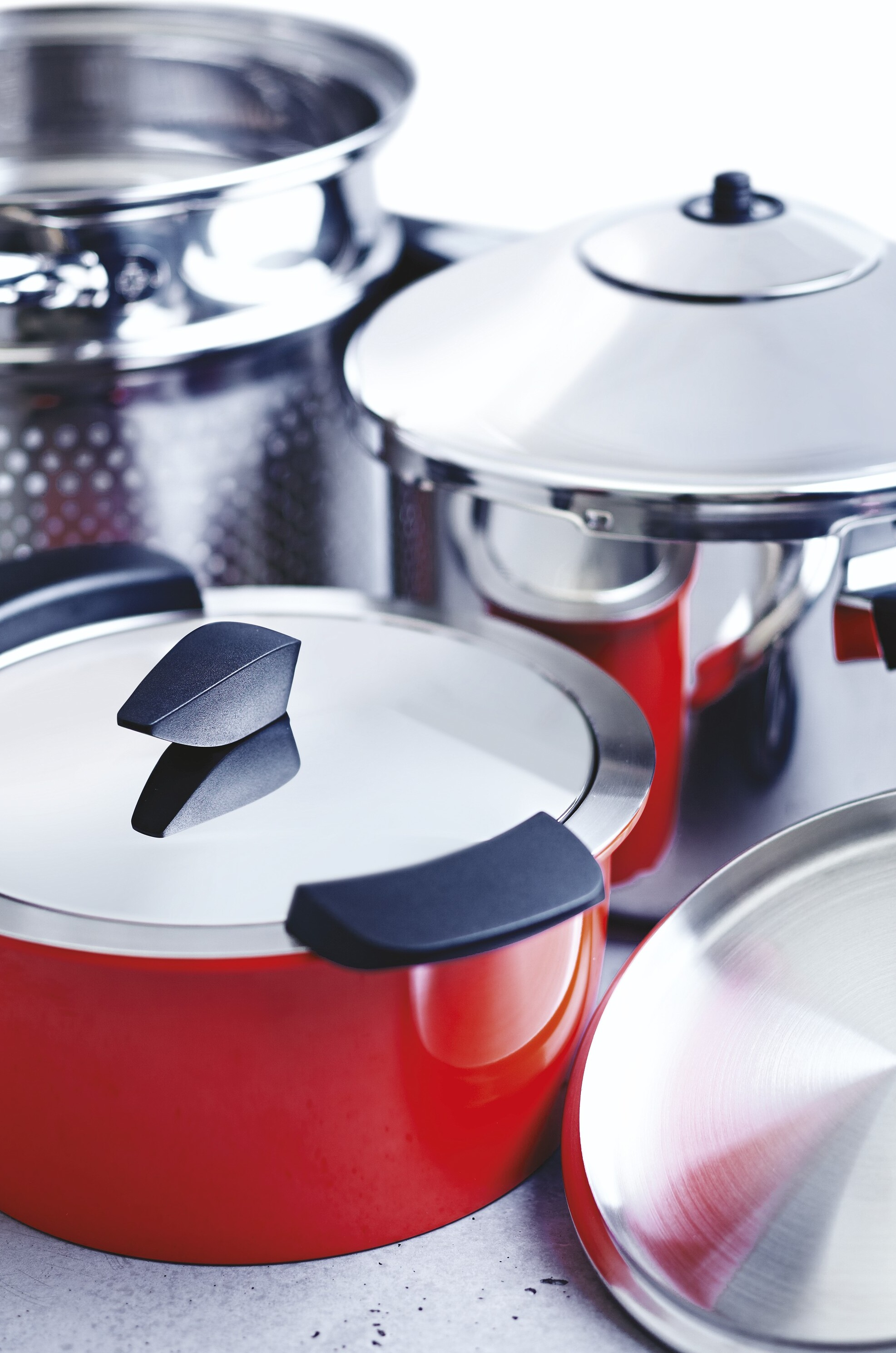 Produkte: Duromatic, Hotpan und Kochgeschirr